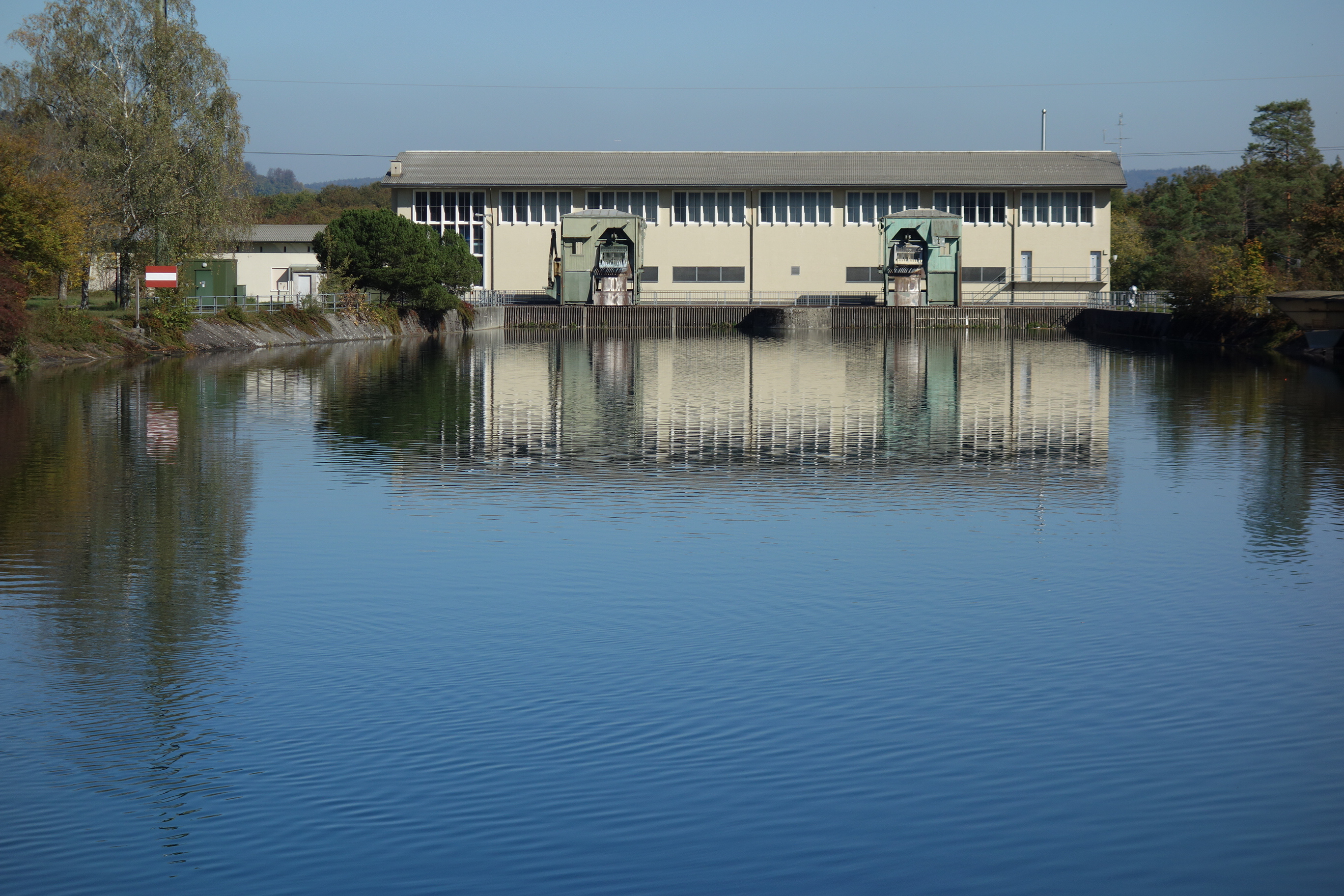 Aarekraftwerk Wildegg-Brugg, Villnachern AG, Schweiz